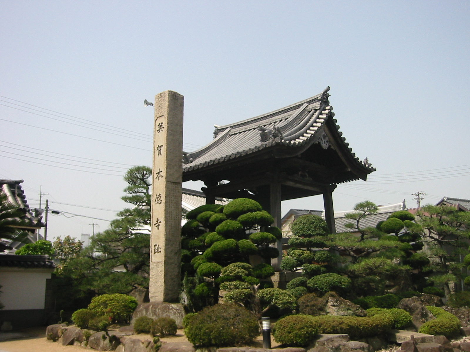 兵庫県英賀 亀山本徳寺跡